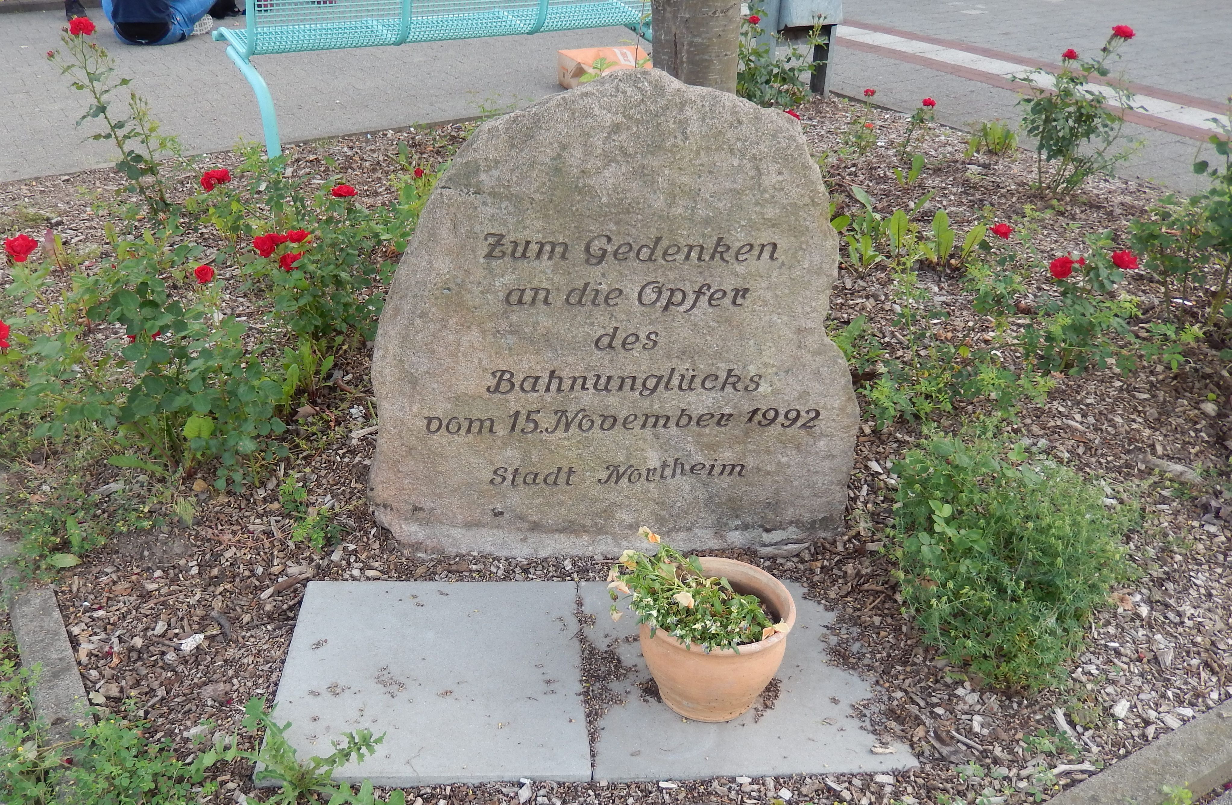 Gedenkstein zum Bahnunglück in Northeim 1992